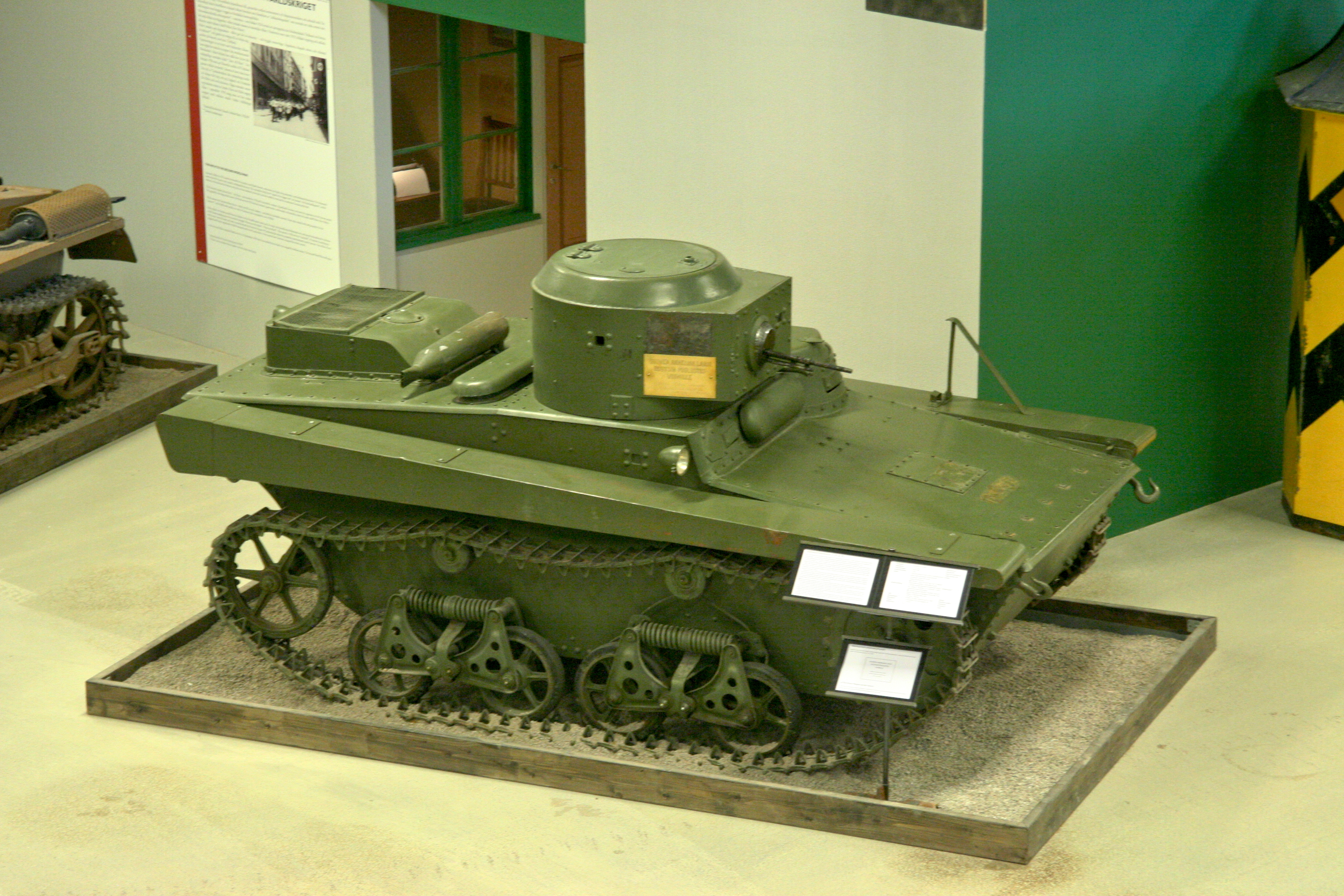 Stridsvagn T-37A finns det i Arsenalen (Sveriges Försvarsfordonsmuseum - Strängnäs) 12.08.2011